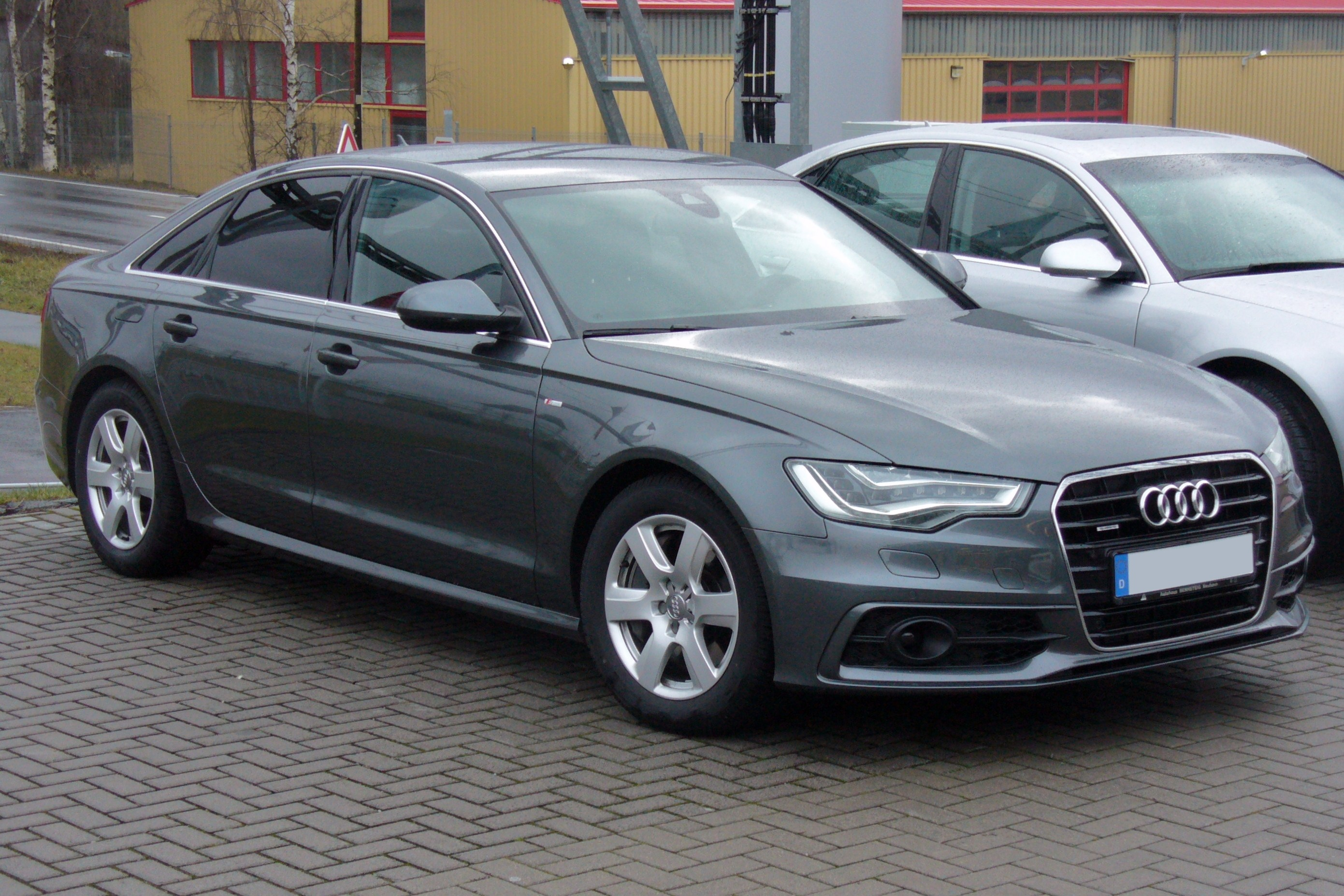 Audi A6 Limousine